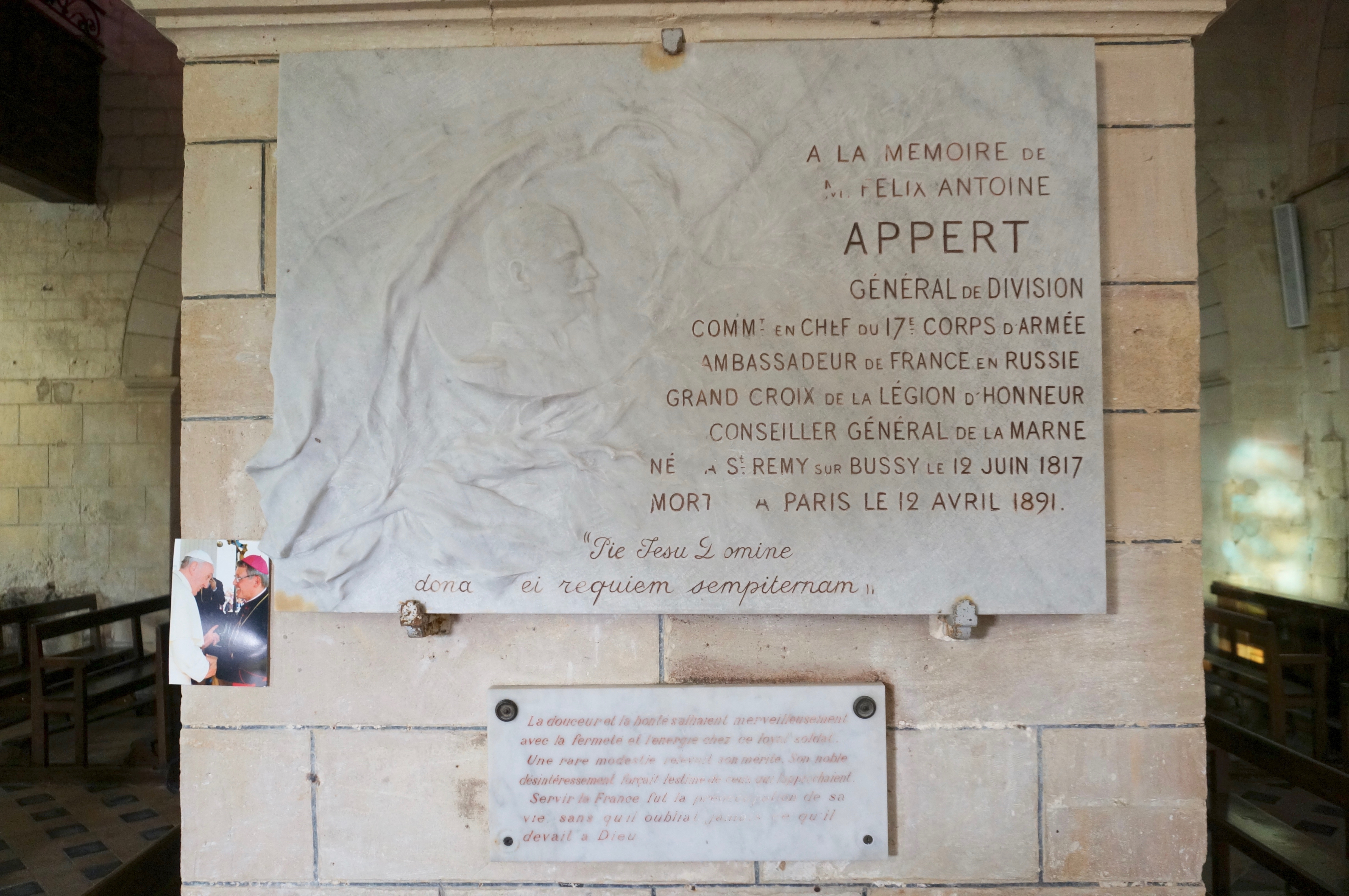 en l'Église dédiée à Remi se trouvant à Bussy.